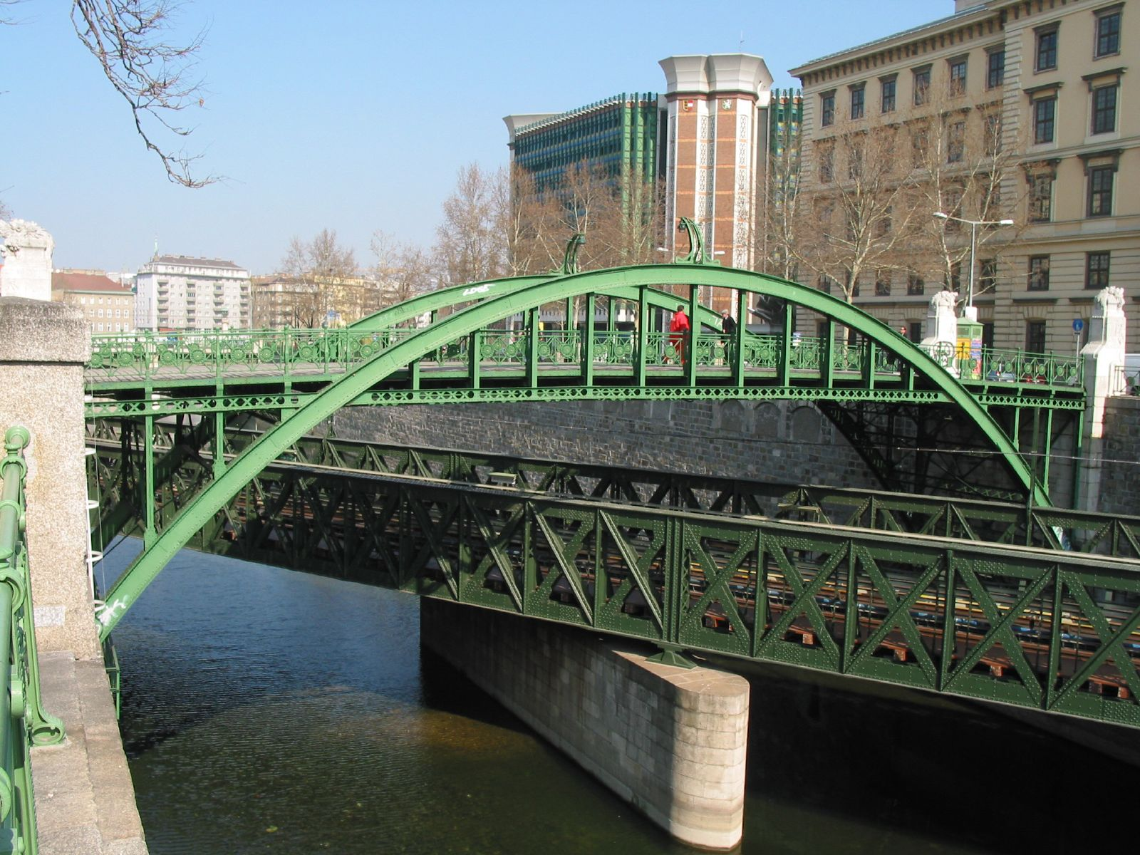 Wien, Zollamtssteg und Zollamtsbrücke. Auf der unteren Brücke fährt die U-Bahn. Der obere Steg ist eine Fußgängerbrücke.